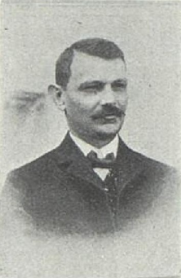 Vincenc Vinař (1874-1915), rakouský a český politik